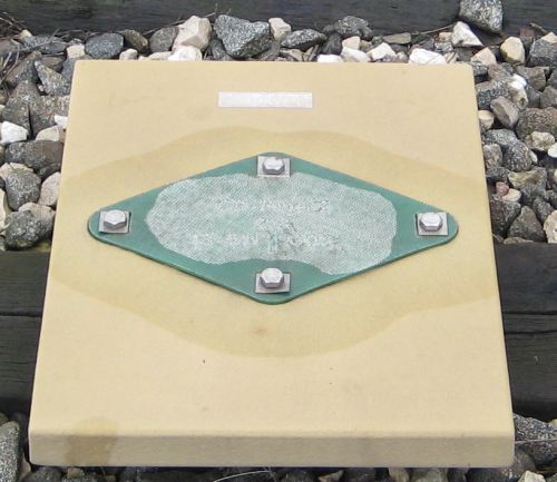 Boa per SCMT